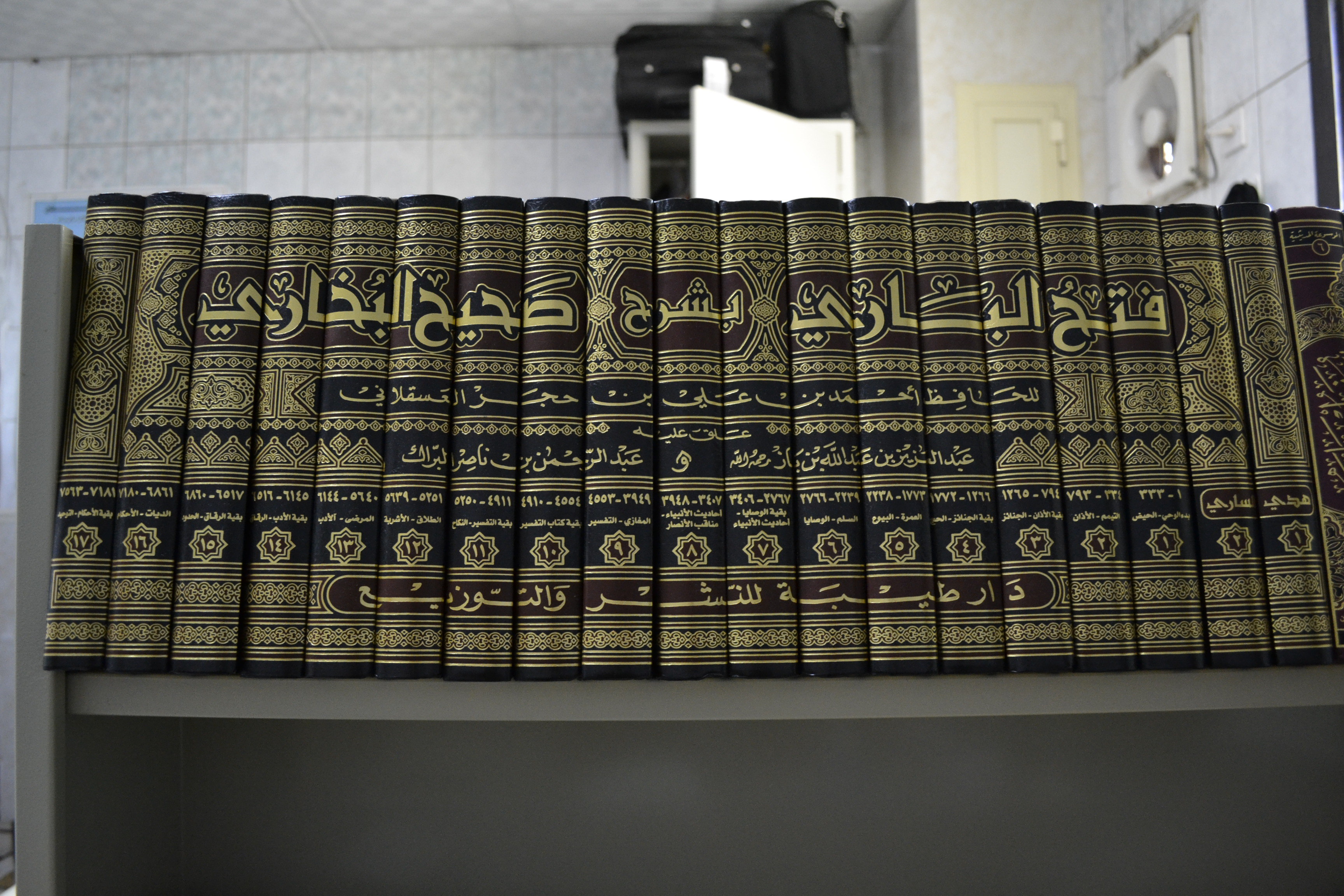 Fathul Bari bisyarhi Shahih al-Bukhari merupakan kitab yang menjelaskan (mensyarah) kitab Shahih al-Bukhari, kitab ini ditulis oleh Imam Ibnu Hajar al-Asqalani